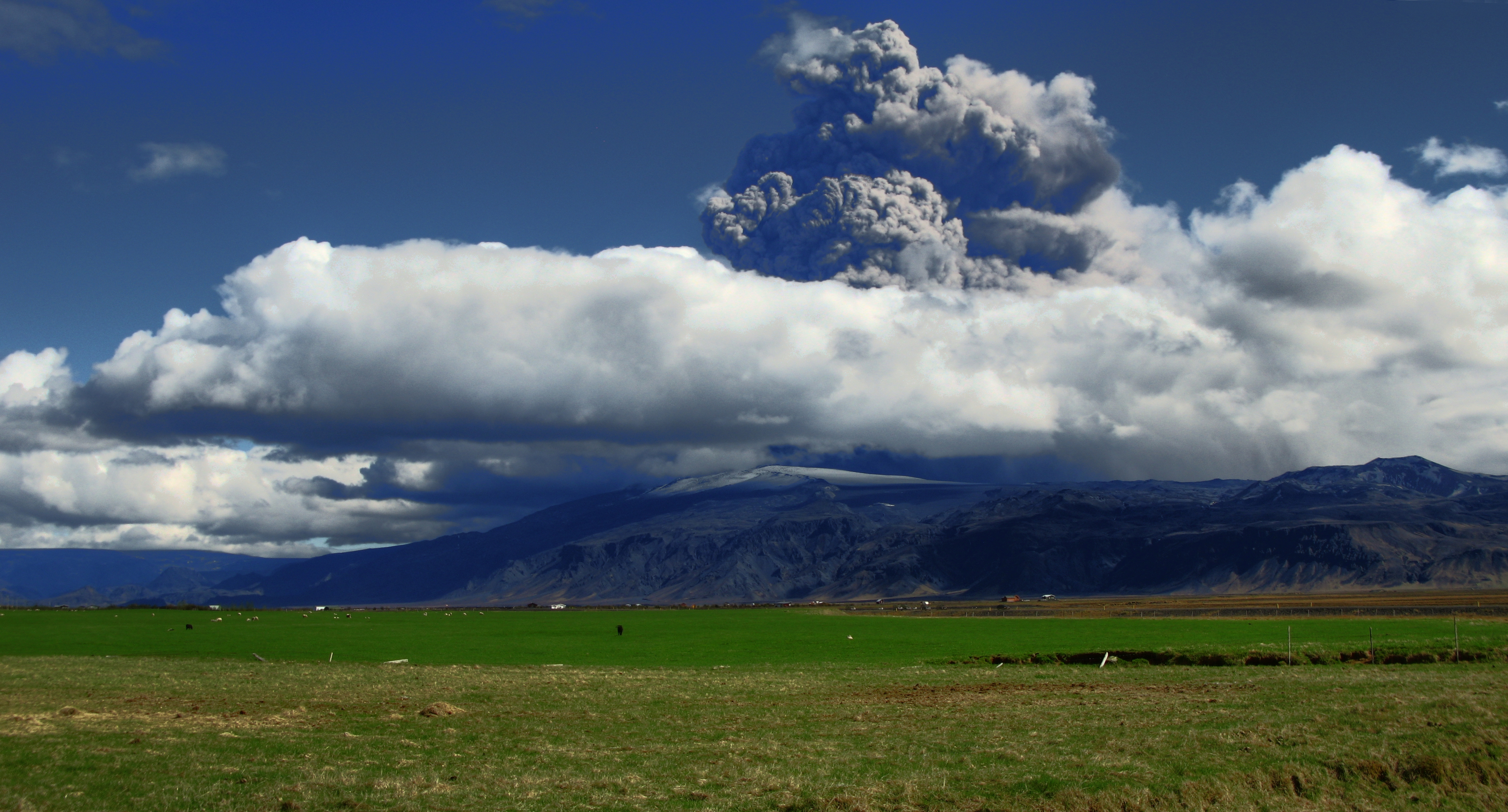 Eyjafjallajökull